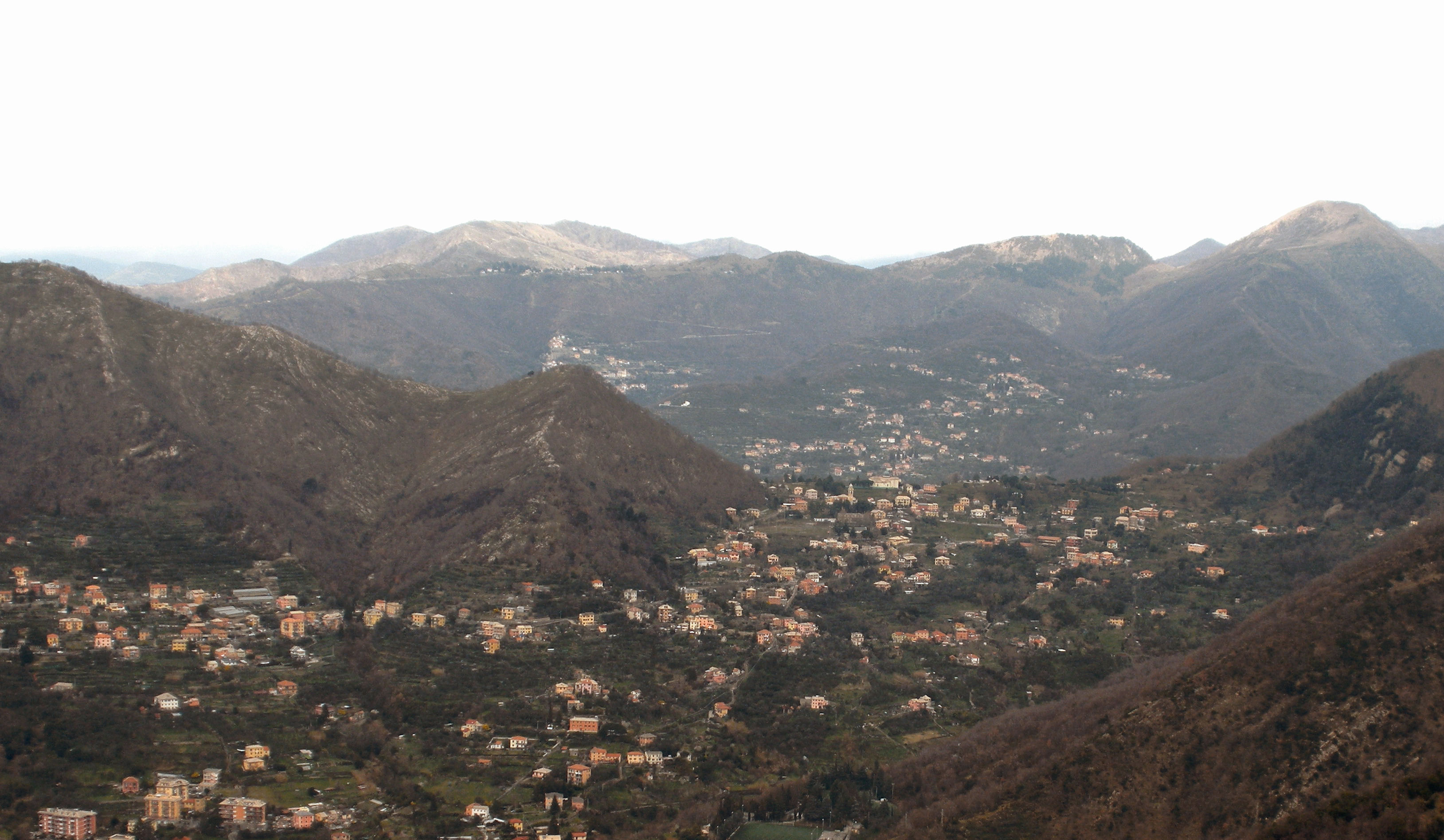 Panorama di Bavari (Genova) Foto propria Marzo 2010